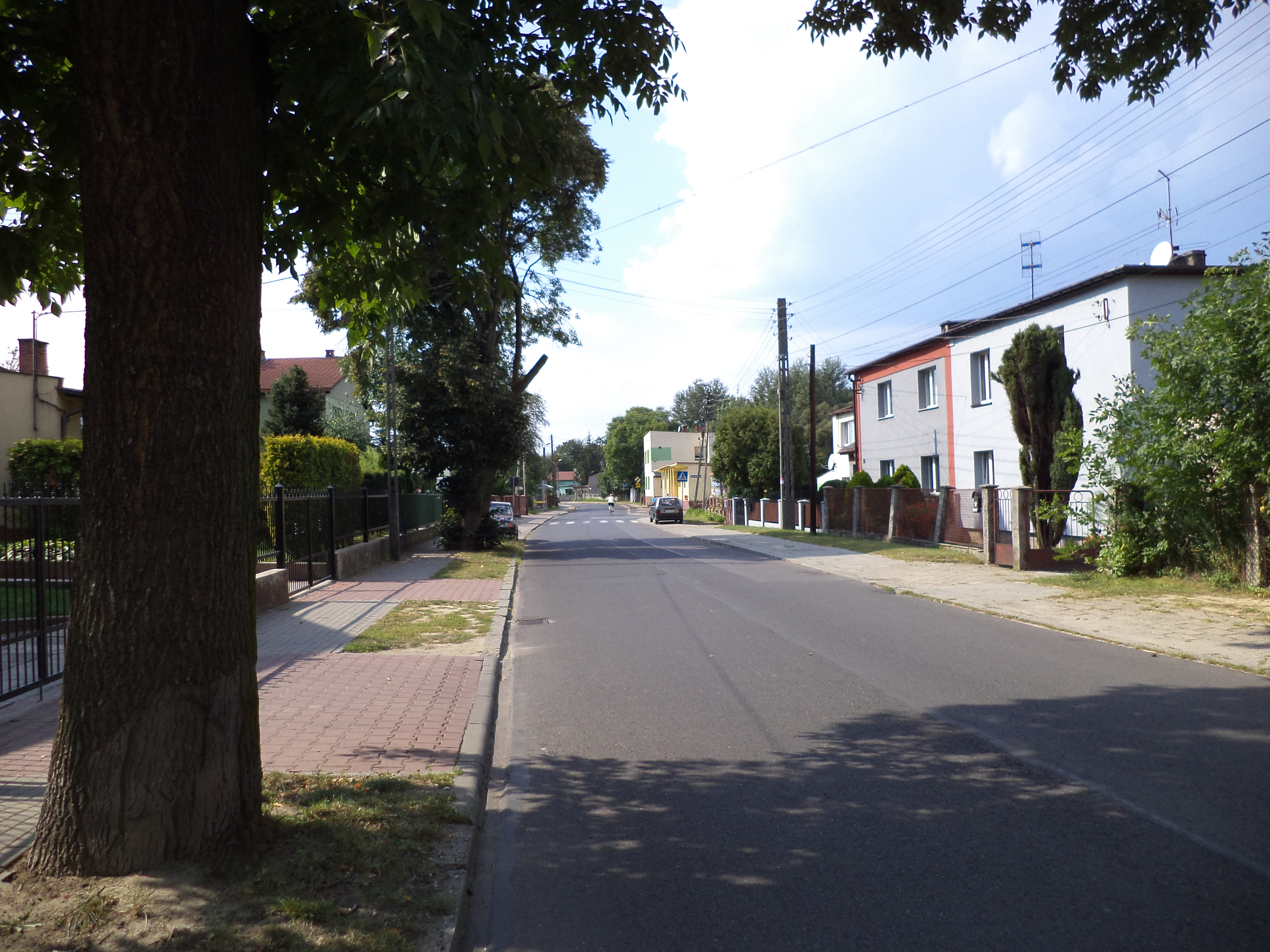 Ulica Juliusza Słowackiego w Tarnowskich Górach-Sowicach